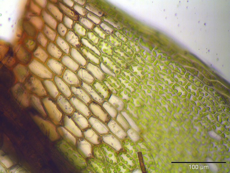 Geneigtfrüchtiges Birnmoos (Bryum imbricatum), Blattbasis, Vergrößerung: 250x